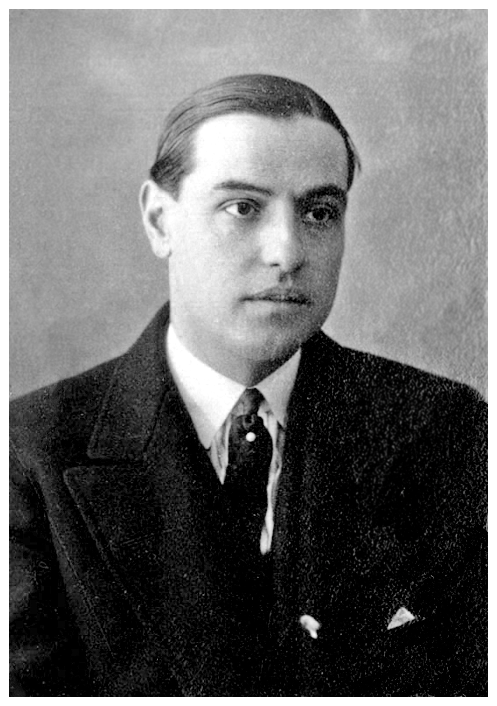 Enrique Carrasco Cadenas